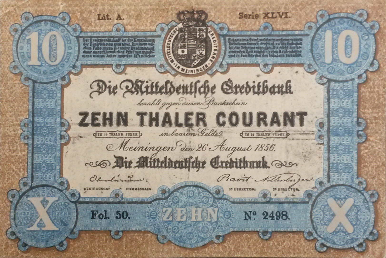 Banknote über 10 Taler der Mitteldeutsche Creditbank von 1856 (Vorderseite). Die Banknoten wurden von Dondorf & Naumann in Frankfurt gedruckt.